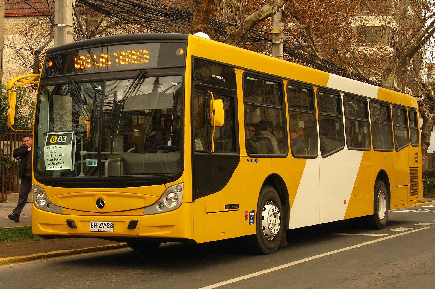 Recorrido local D03, del sistema Transantiago. Comuna de Ñuñoa, Santiago de Chile.